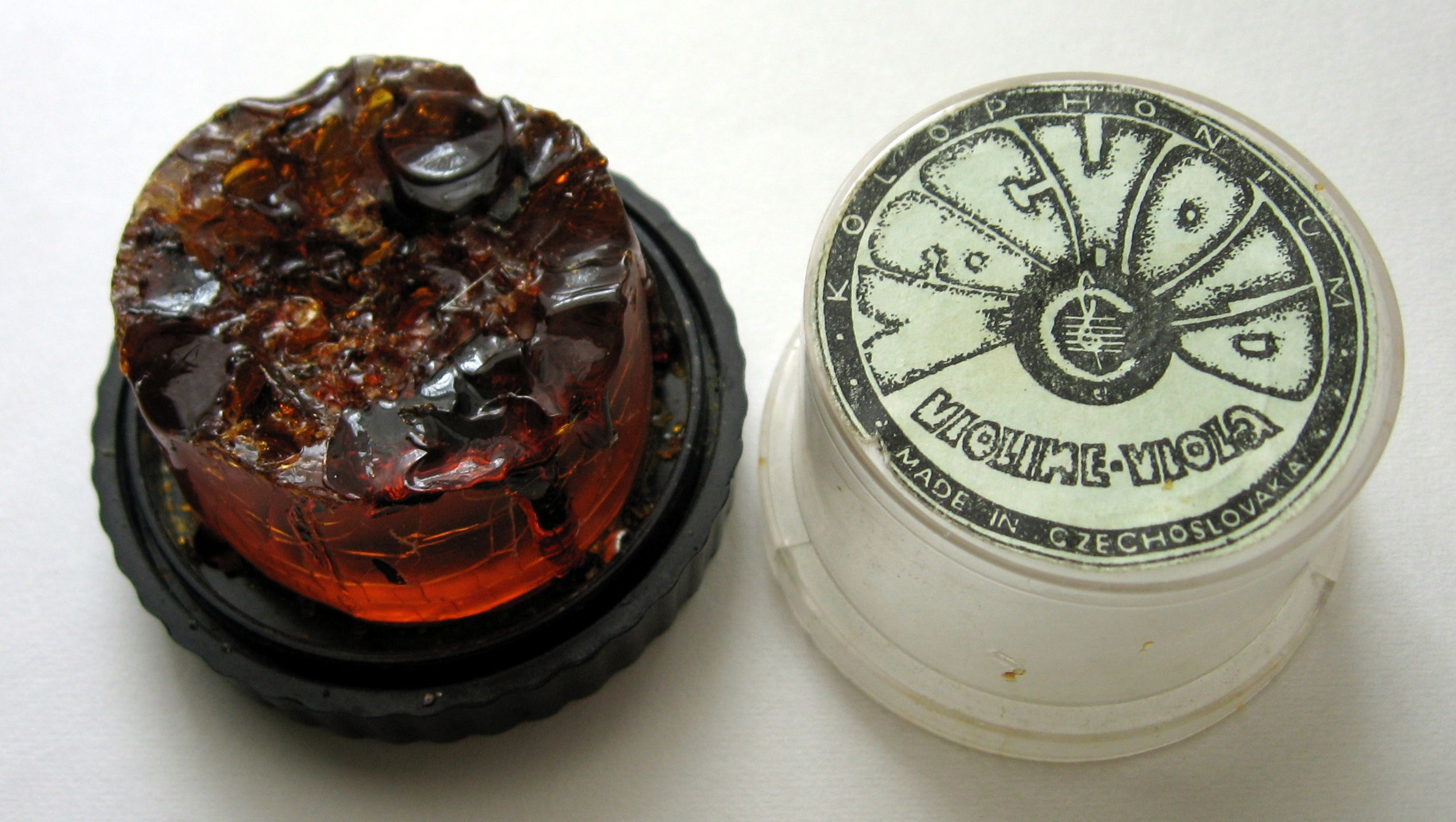 Rosin